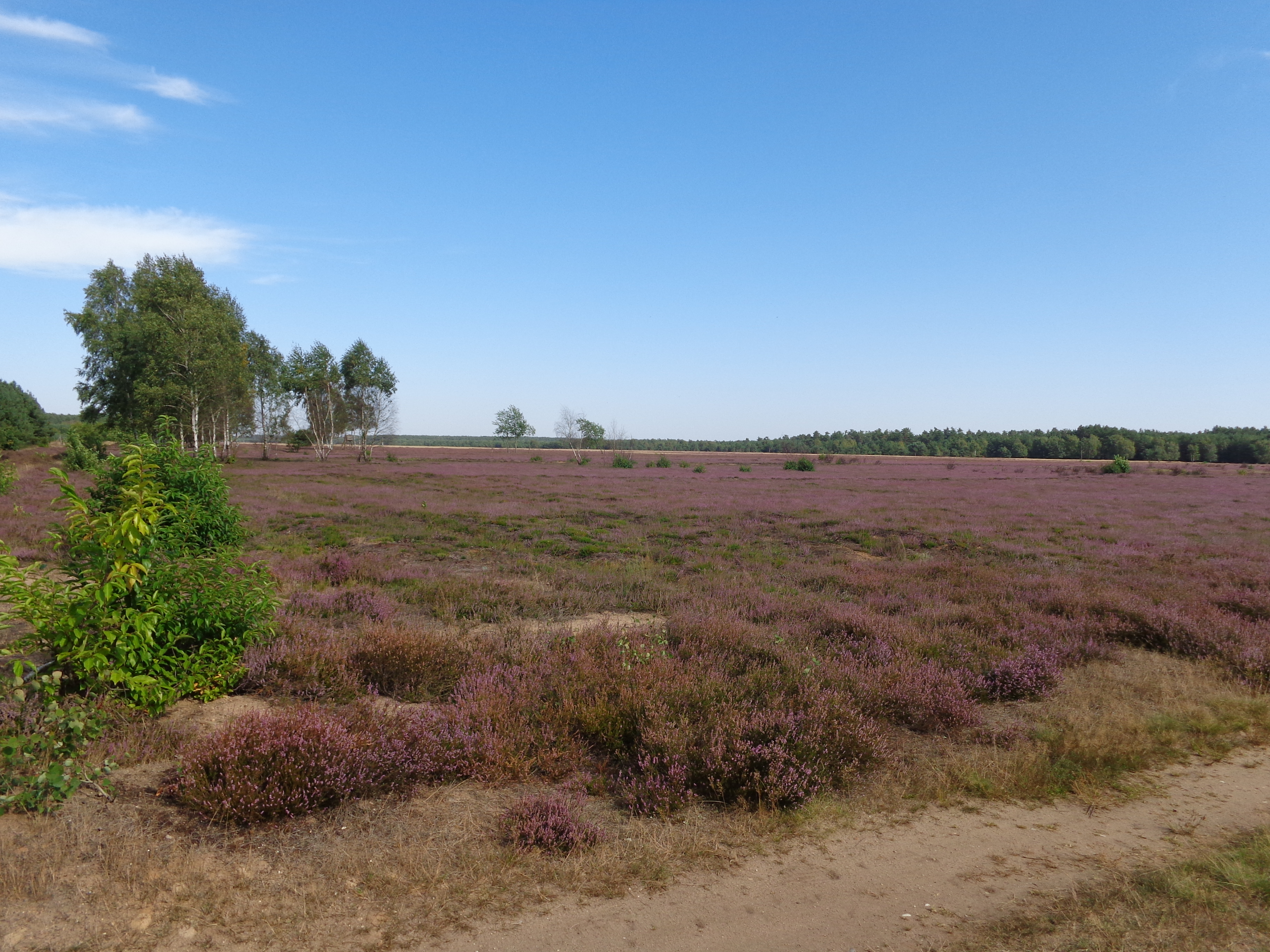 Retzower Heide in Südmecklenburg